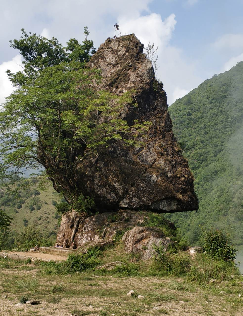 नेपाली: ललितपुर जिल्ला, महांकाल गाउपलिका-१ गोटिखेलमा अवस्थित चनढुंगा। हिमवत खण्डमा उल्लेख भएकाे बैतर्णिधाममा स्नानगरि जललिएर चनढुंगाकाे चन्दनसहित कालेश्वर महादेवकाे दर्शन गर्दा सुर्य, काल र व्याधाले माेक्ष प्राप्त गरेकाे स्थान।